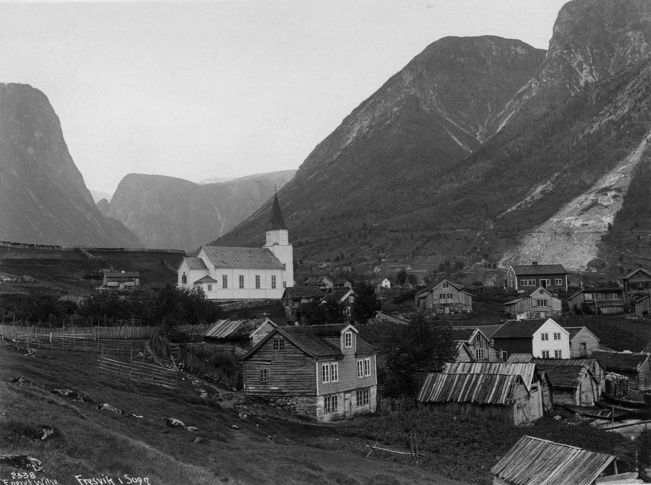 Fresvik kirke. Foto: Axel Lindahl, troli fra 1880-årene. Fra Norsk Folkemuseums samling i Digitalt museum. Inventarnr.: NF.08383-001.